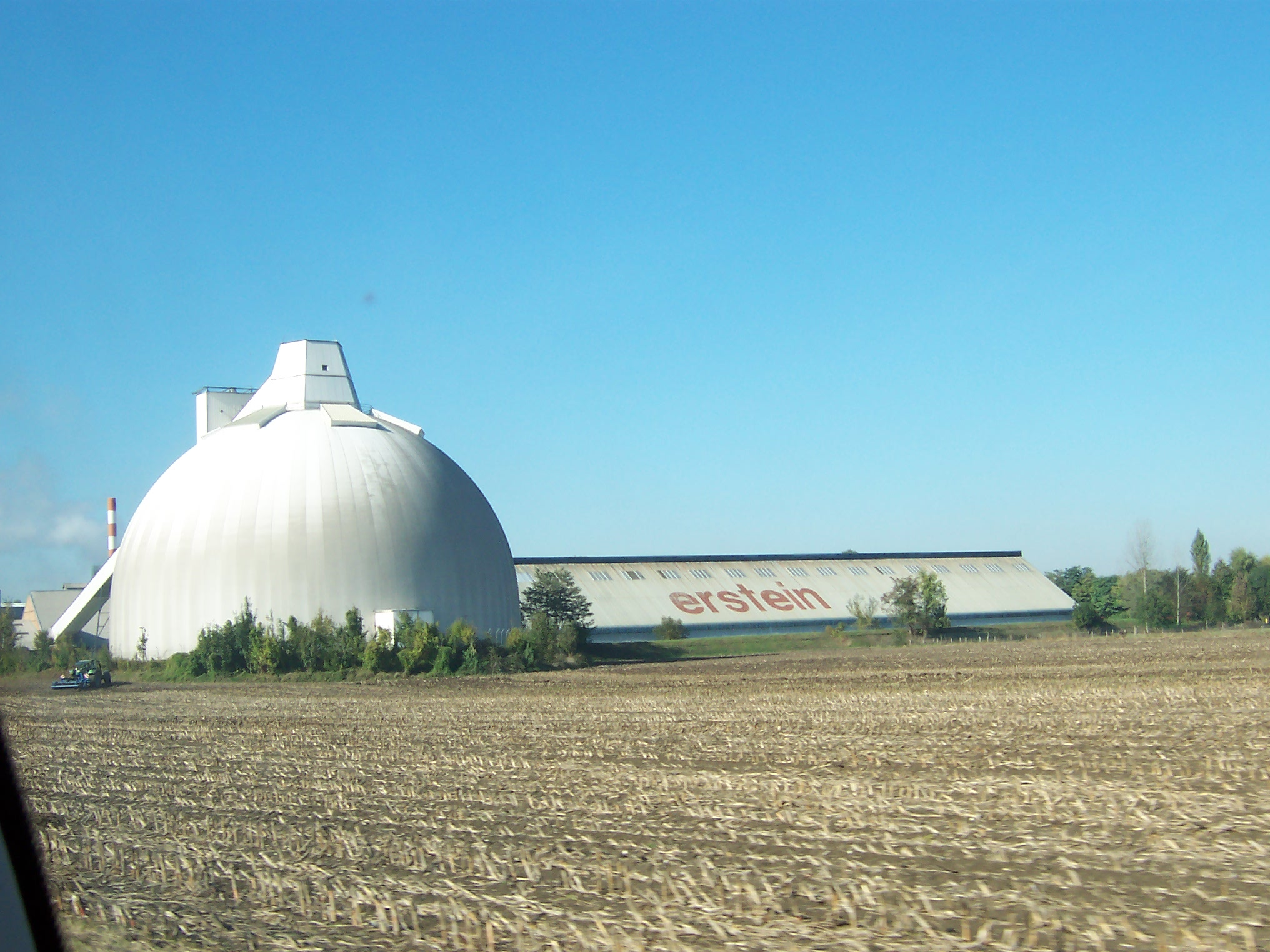 Die Zuckerfabrick Erstein in Erstein